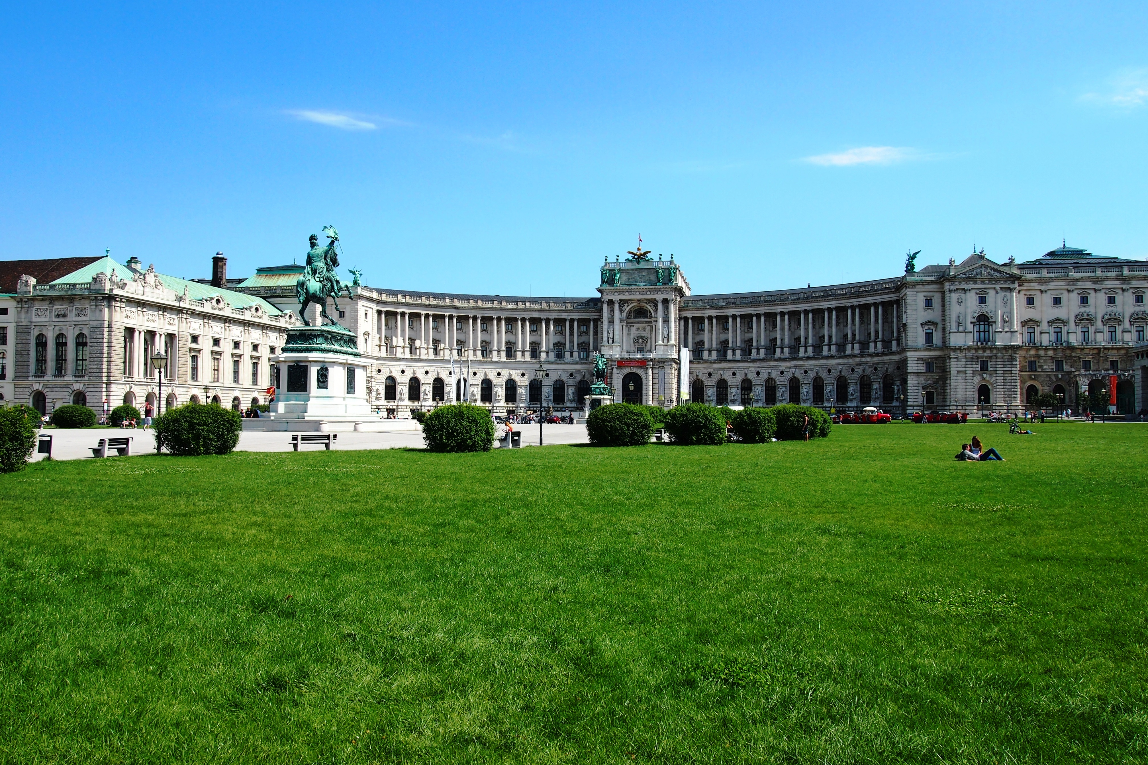 Heldenplatz mit Neuer Hofburg